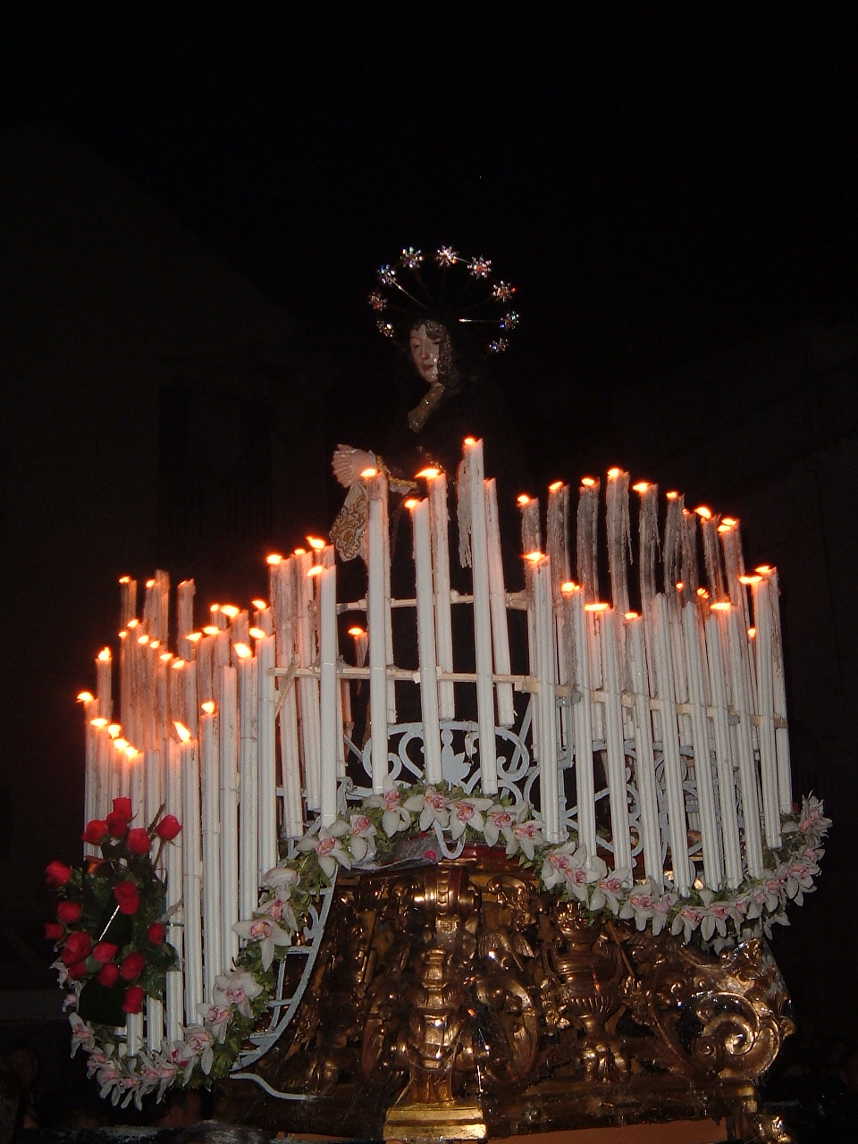 Foto mia